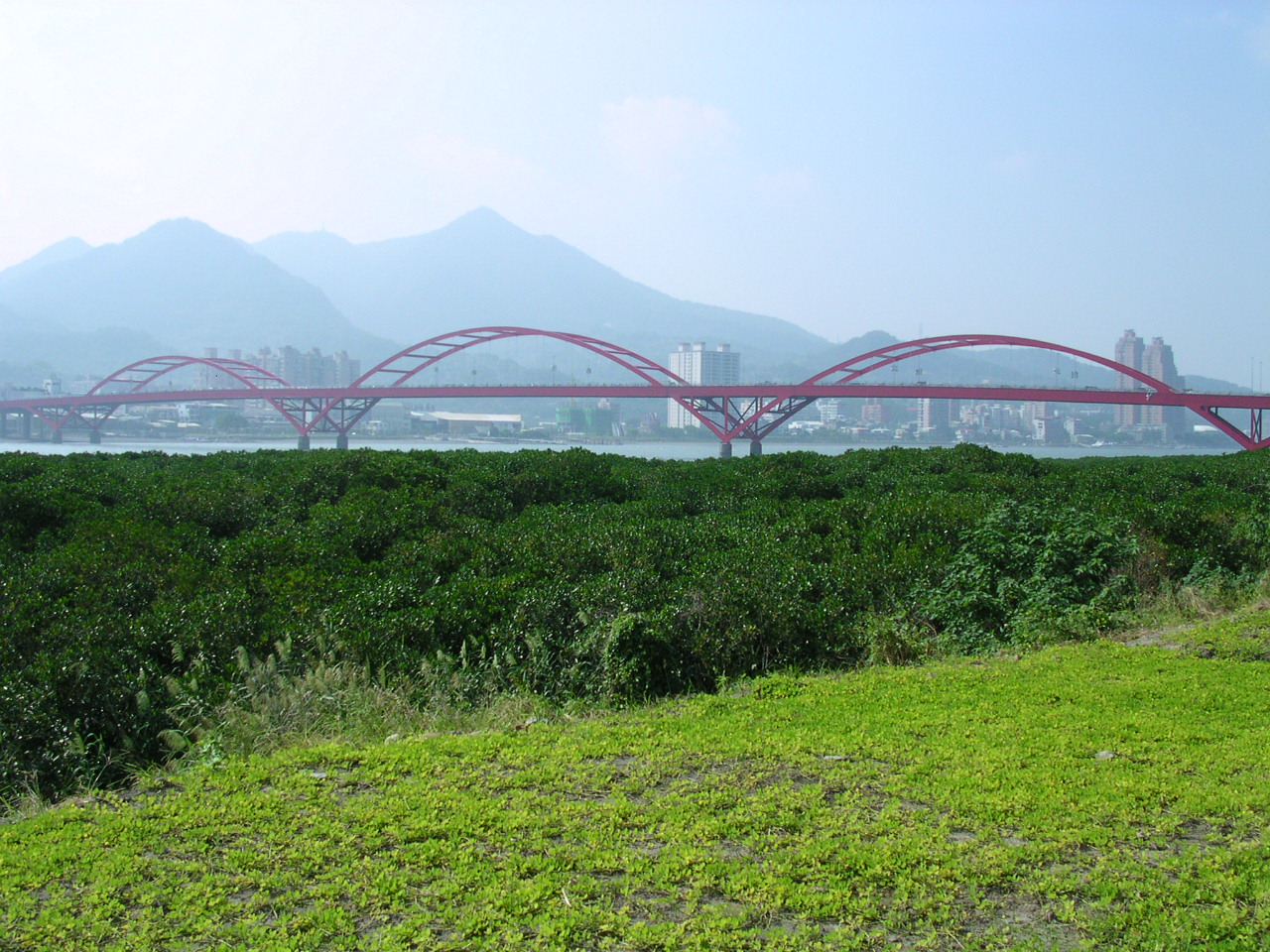 中文（台灣）: 跨越淡水河的關渡大橋。